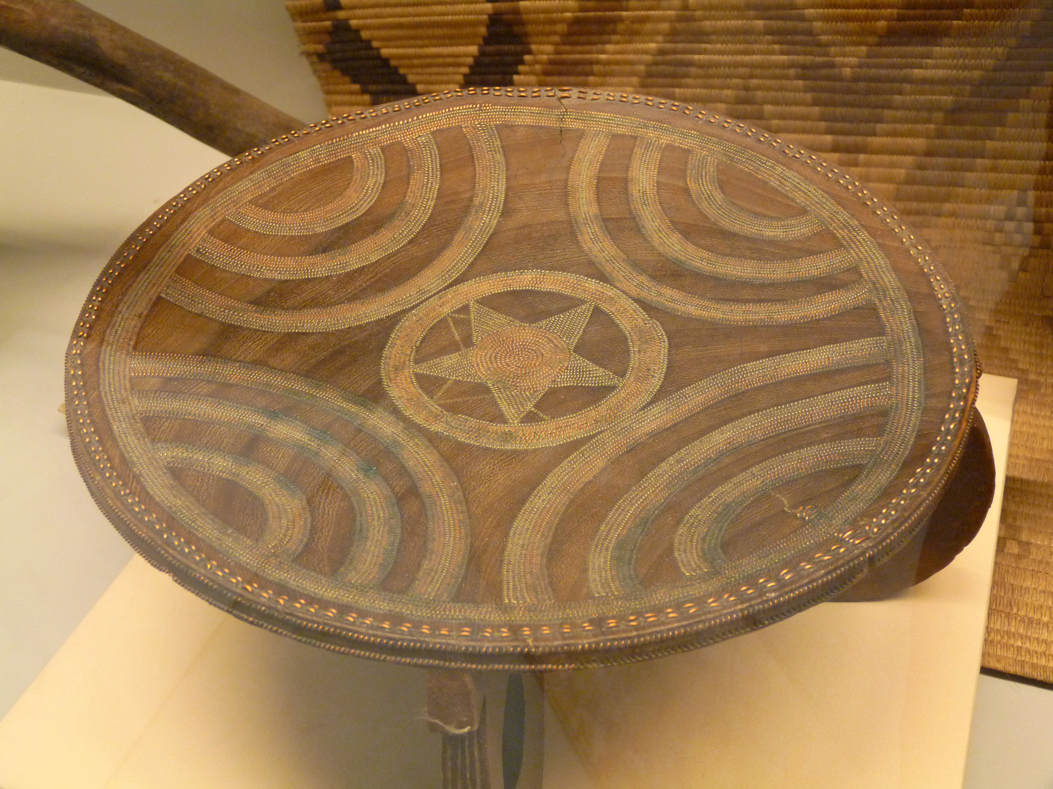 Kamba (Kenya) : tabouret. Musée royal de l'Afrique centrale